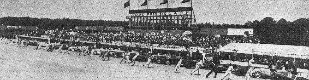 Départ du Grand Prix de France 1936.